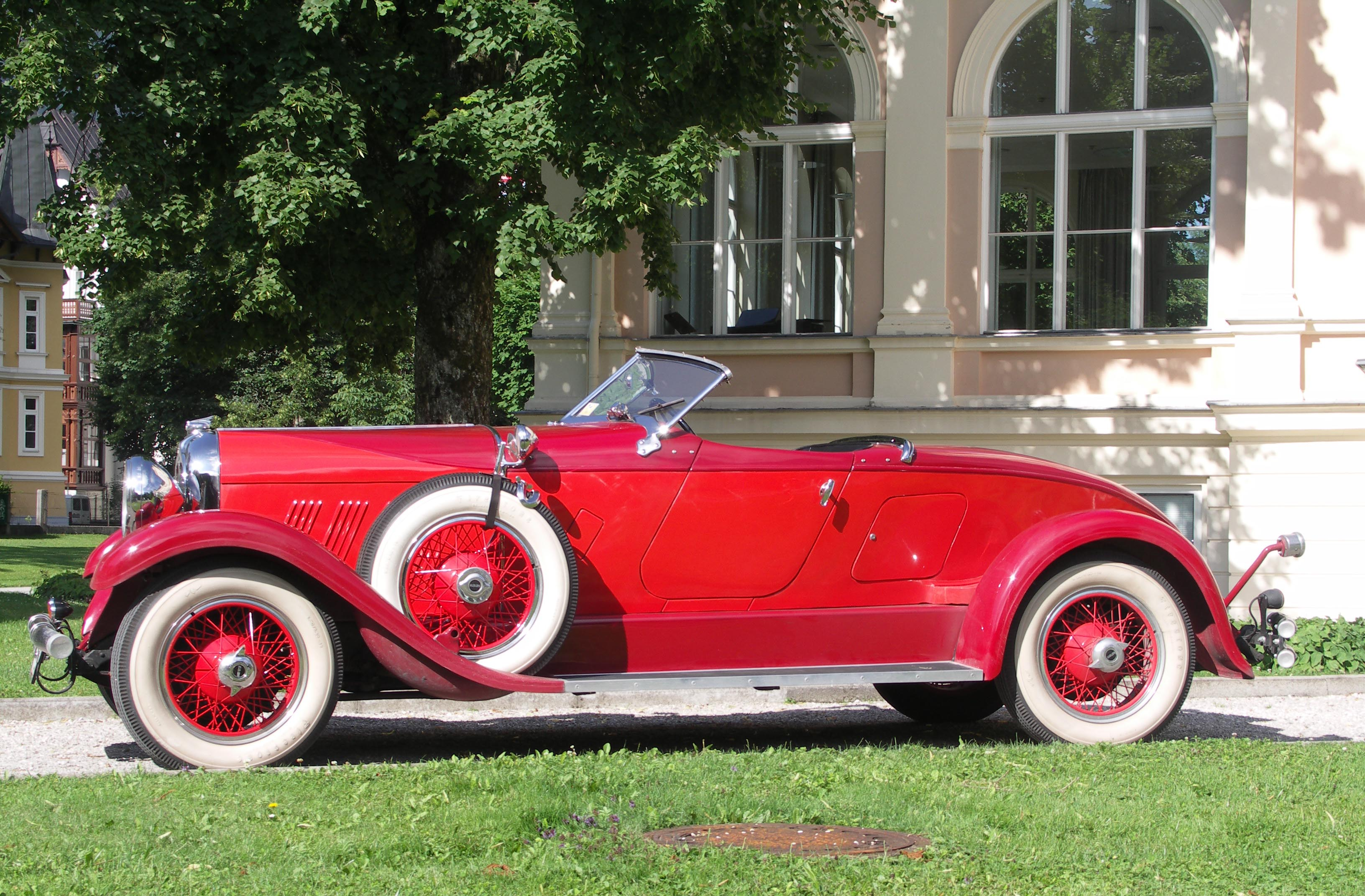 Auburn 8-90 Speedster 1929, hier mit aufgesetzter Dachbefestigungsleiste auf der Windschutzscheibe